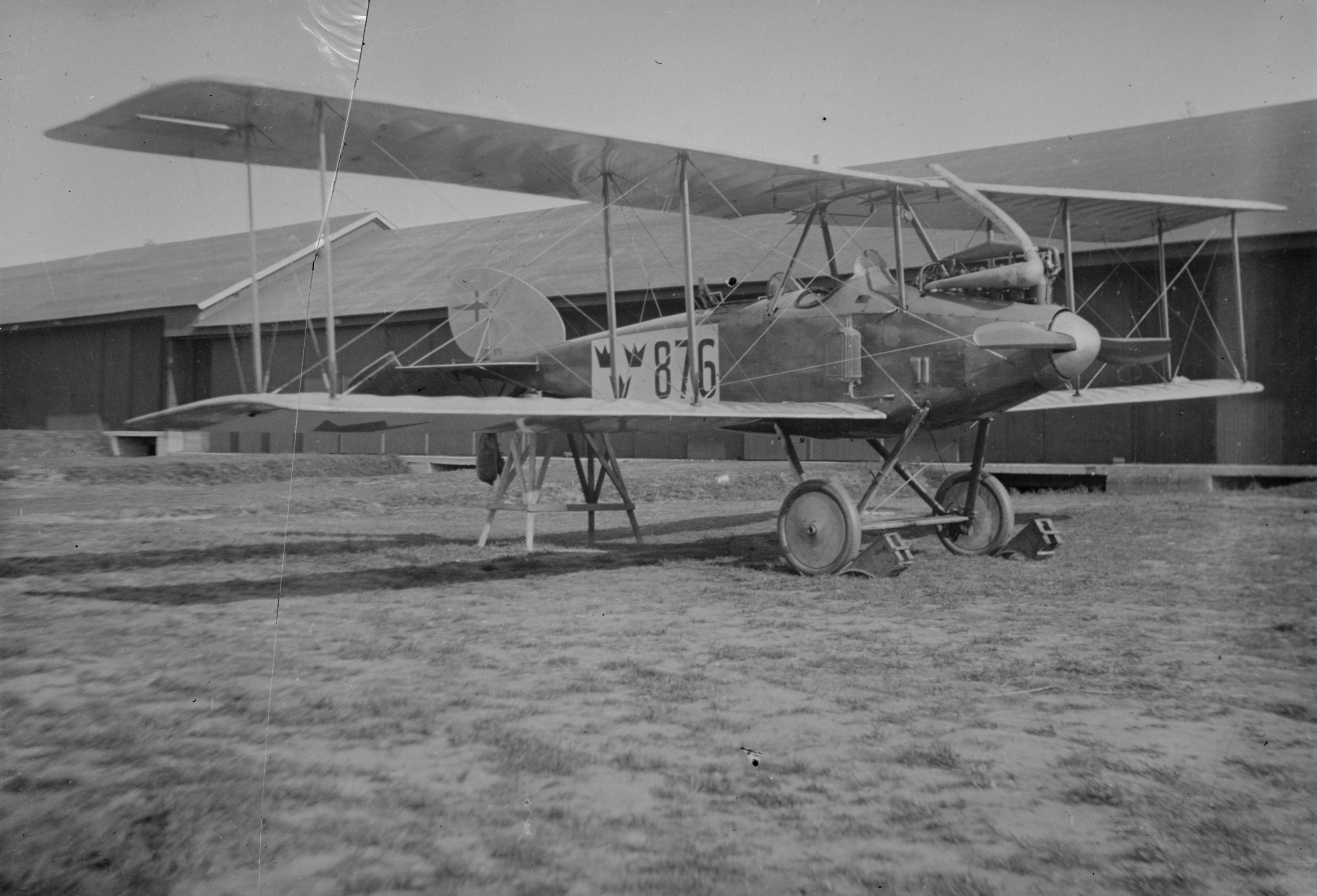 Flygplan Thulin FA märkt nummer 876 ur Flygkompaniet på marken.